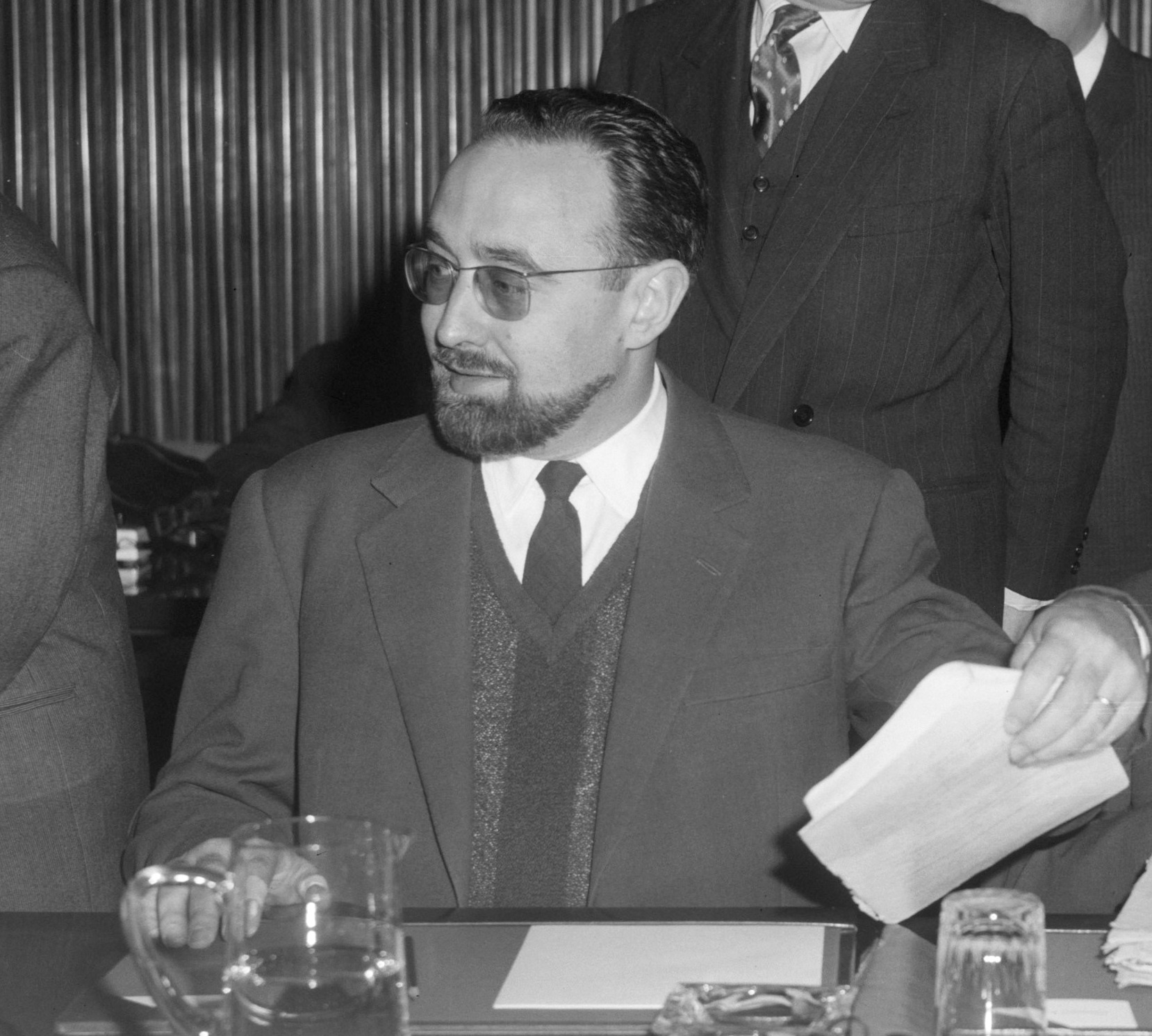 Ministerraad van de EEG te Brussel bijeen gekomen, de Franse Minister van Landbouw Edgar Pisani tijdens persconferentie (met baard)